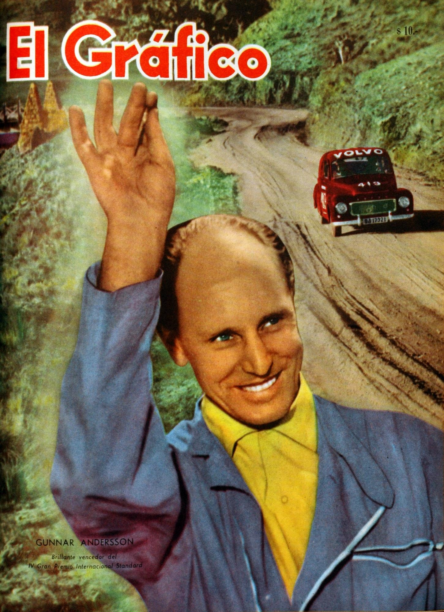 El Grafico del 02 de Noviembre de 1960. Edicion 2145